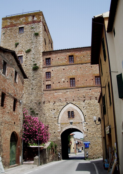 Lato interno del Cassero Senese di Paganico (GR), Tuscany (Italy)